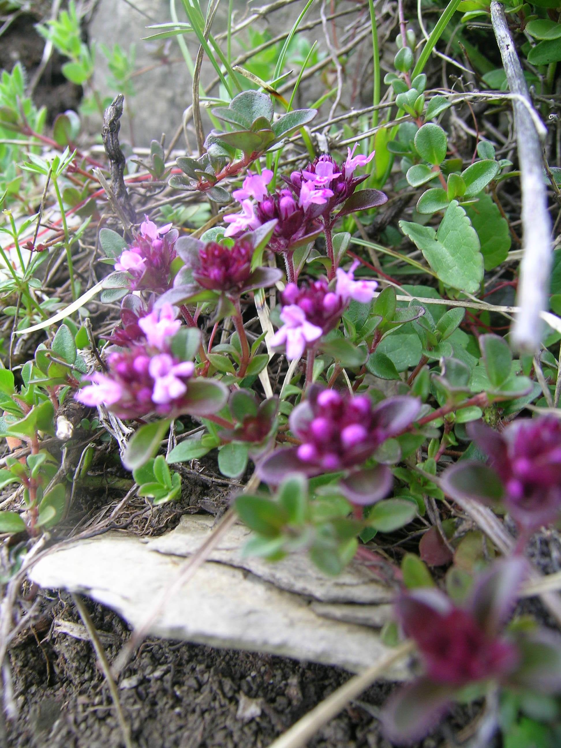 Thymus pulegioides, Schynige Platte, Kanton Bern, Schweiz